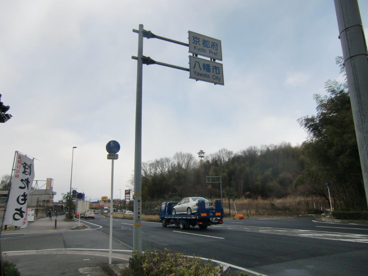 国道一号線、大阪府側より